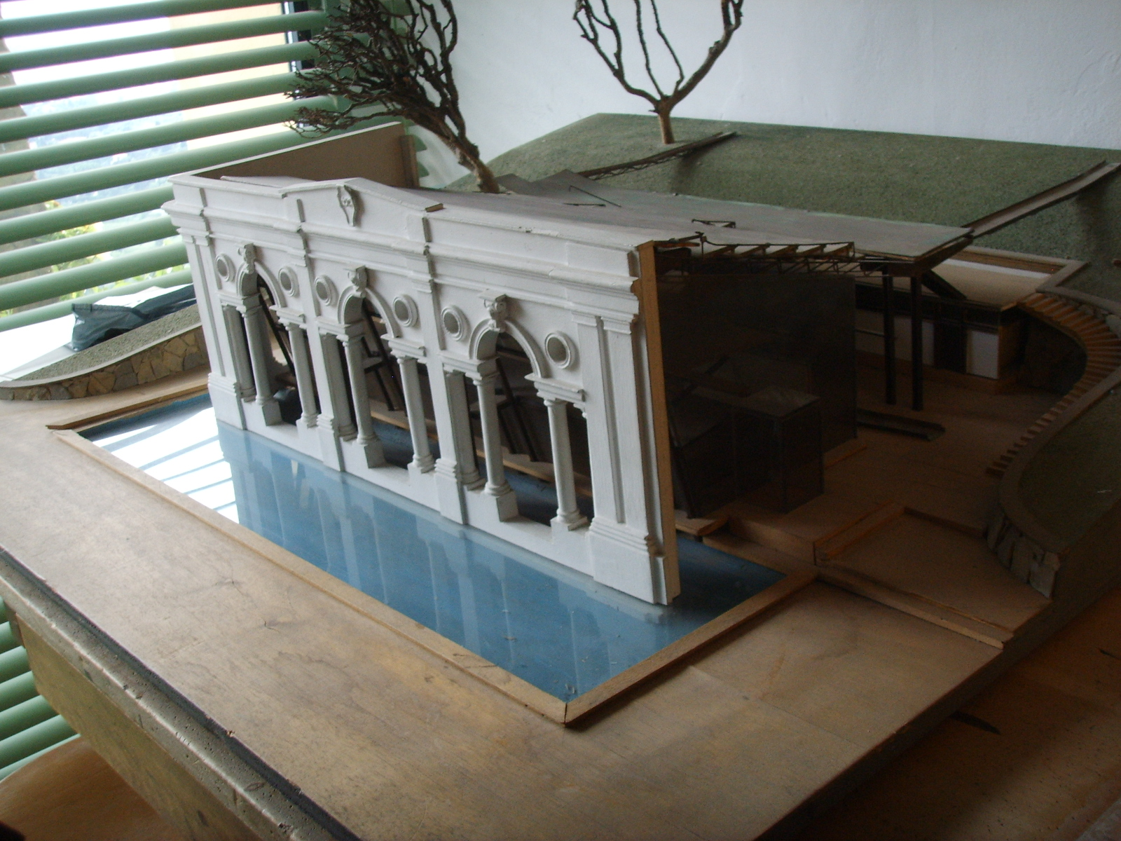 Villa il roseto, plastico della limonaia di villa strozzi, plastico alla